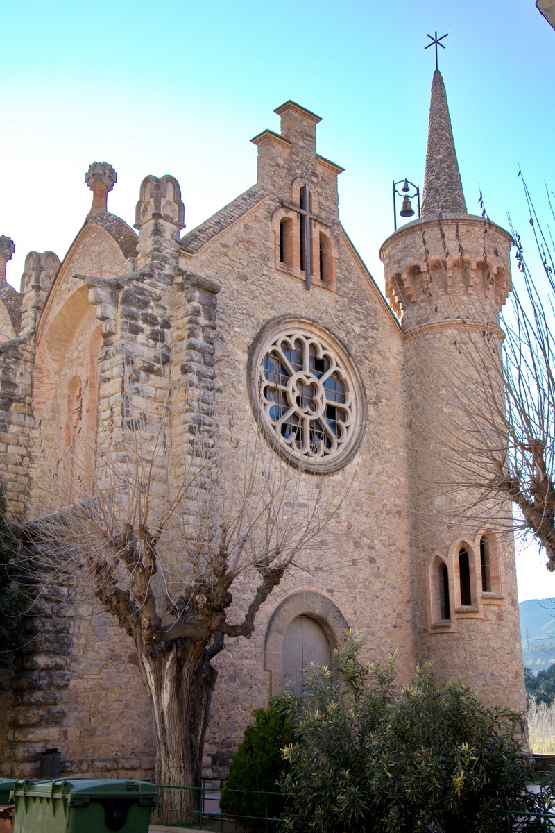 Església de la Sagrada Família de la Bauma (Castellbell i el Vilar)